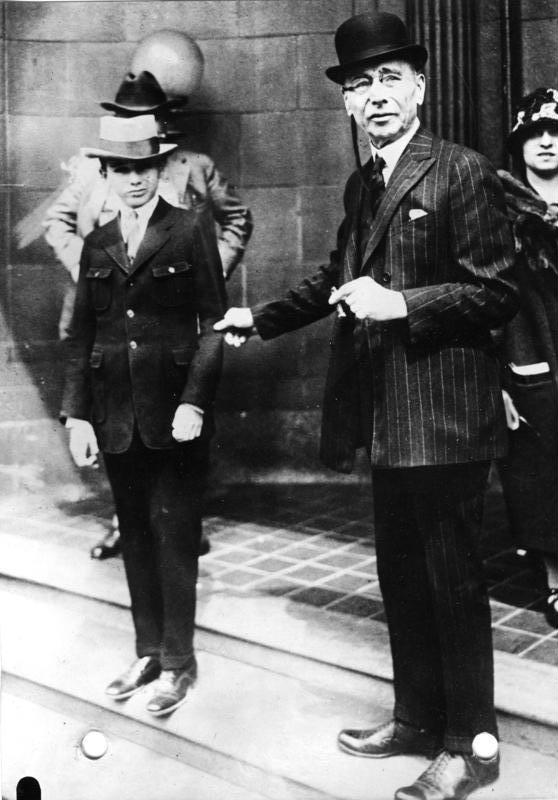 Zu dem sensationellen Mord-Prozess der amerikanischen Millionärssöhne Richard Loeb und Nathan Leopold in Chicago! Der 14jährige Millionärssohn Robert Franks, welcher von Richard Loeb und Nathan Leopold ermordet wurde, mit seinem Vater.